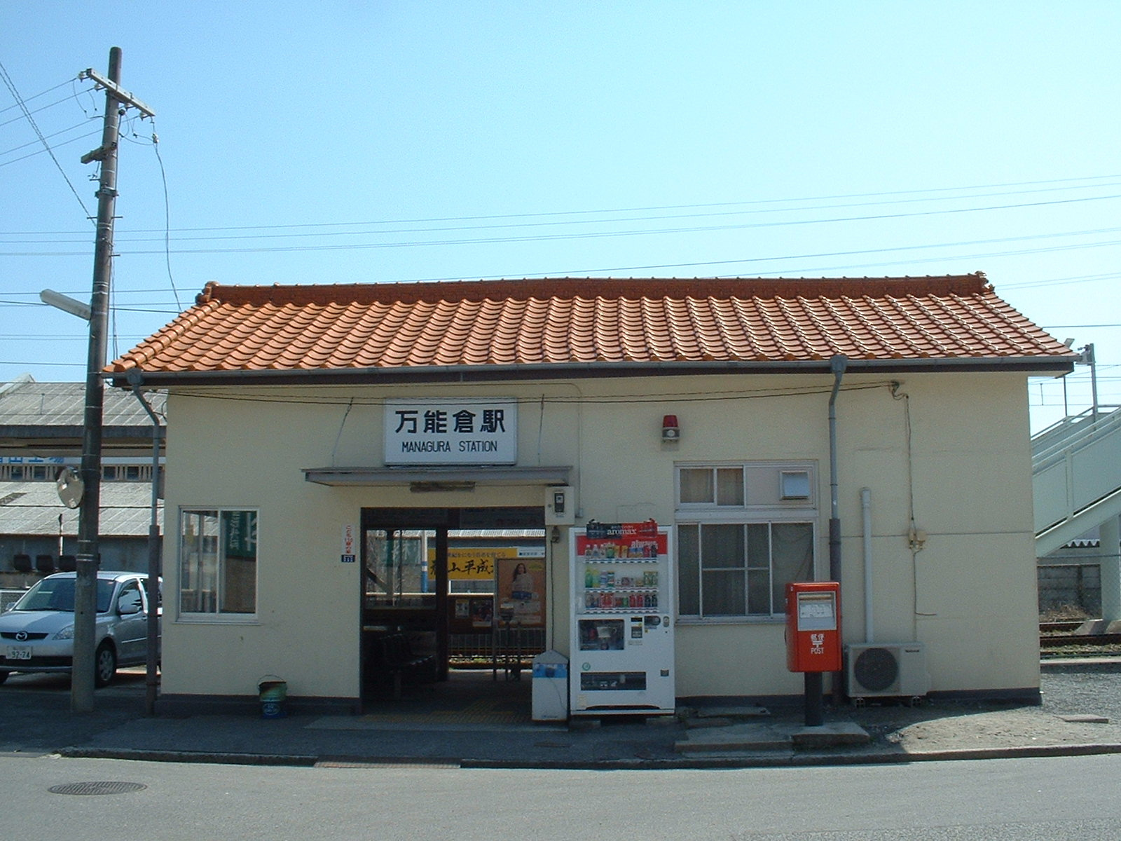 万能倉駅、2006年3月25日に投稿者が撮影